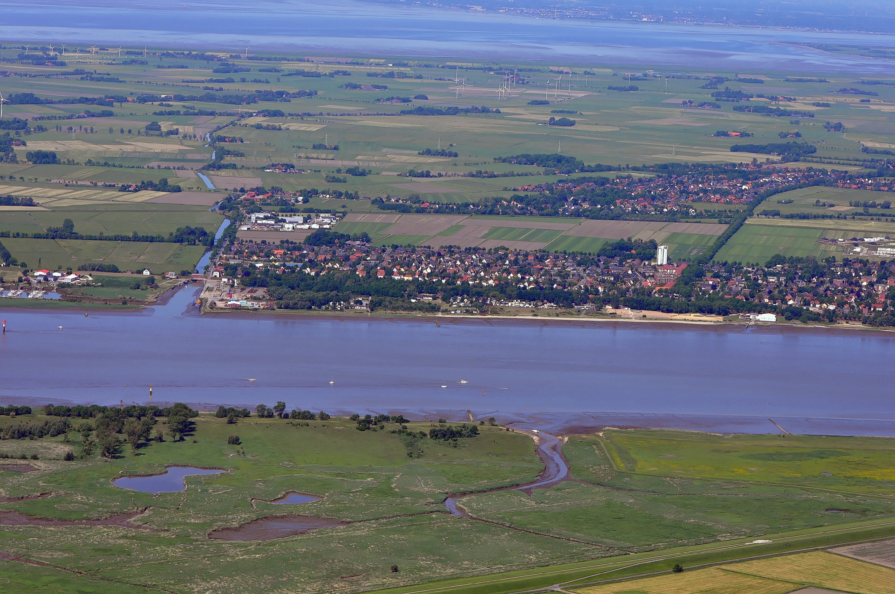 Großensiel, Nordenham, Abbehausen. Luftbilder von der Nordseeküste 2012-05